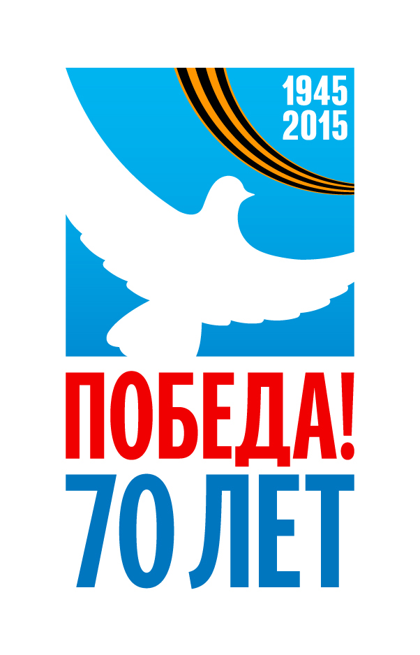 Центральным элементом графической части логотипа является изображение белого голубя. Голубь – легко узнаваемый символ мира. Дополнительный графическо-символьный элемент – изображение георгиевской ленты, опоясывающей синюю плашку. Цветовая схема ленты – цвета Победы, Памяти; небесно-синий цвет – цвет Новой Жизни, Неба, Весны. Главный смысловой элемент логотипа – летящий голубь – расположен в визуальном центре синей плашки, сочетание синего фона и белого силуэта птицы делает графику логотипа воздушной и открытой. Написание выполнено строгим рубленым шрифтом на контрастном фоне, что улучшает читаемость. Декорирование композиции изображением георгиевской ленты указывает на тему празднования. Использование цветов российского триколора подчеркивает высокий государственный статус празднования. В логотипе отсутствуют традиционные тяжеловесные, многократно использованные символы. Благодаря этому он легкий и максимально лаконичный. Символика логотипа не может вызвать никаких негативных ассоциаций, она понятна всем поколениям. Яркий, праздничный характер логотипа позволяет активно использовать его элементы при разработке оформления объектов городской среды.